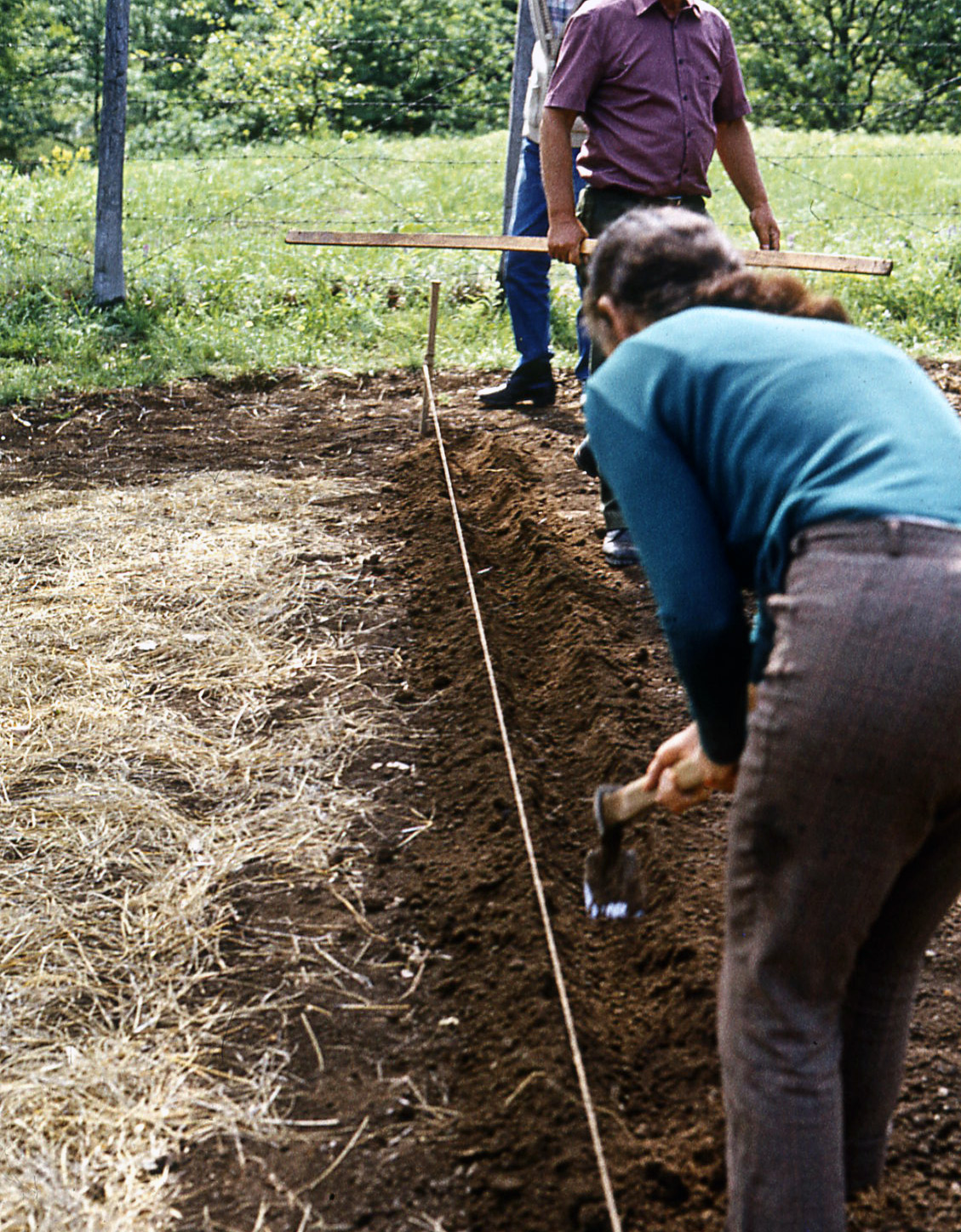 Отварање сетвене бразде мотичицом (аутор: Михаило Грбић).